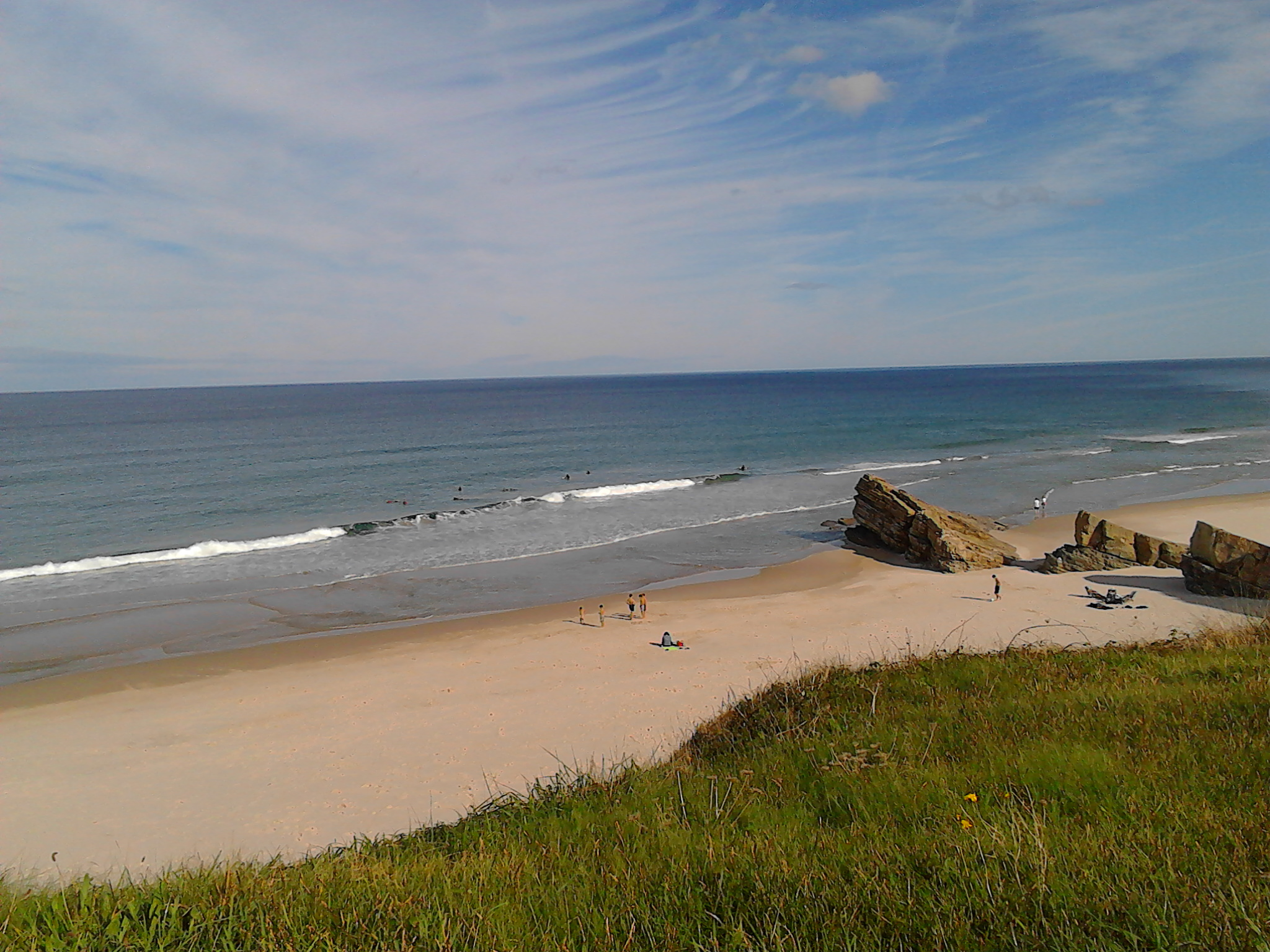 Surfistas en Lóngara, San Pedro de Benquerencia Licensing Categoría:Imaxes de praias da provincia de Lugo Categoría:Imaxes de Barreiros